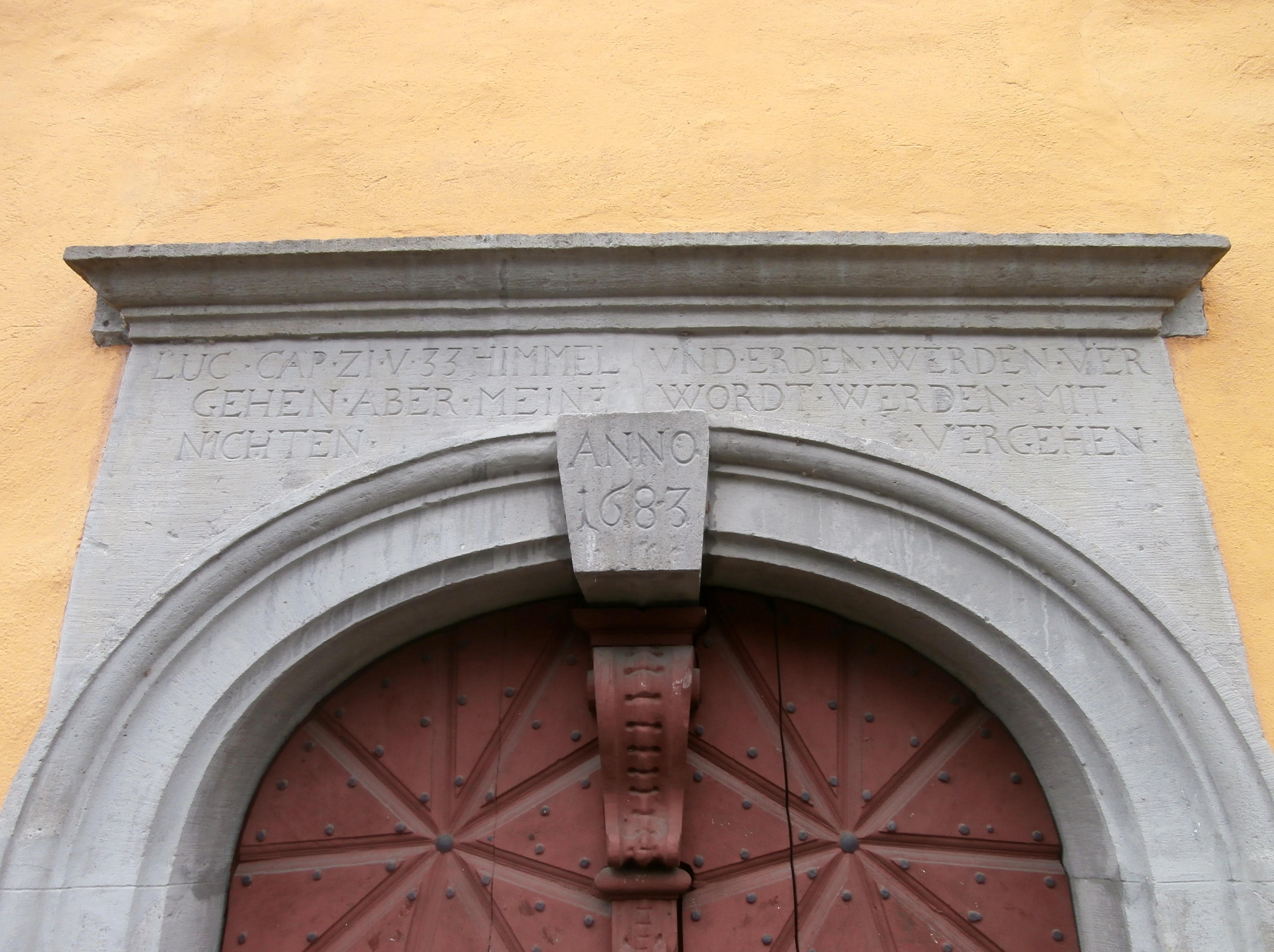 Alte Evangelische Kirche, Ecke Königswinterer Straße/Zipperstraße, Bonn-Oberkassel: Eingangsportal